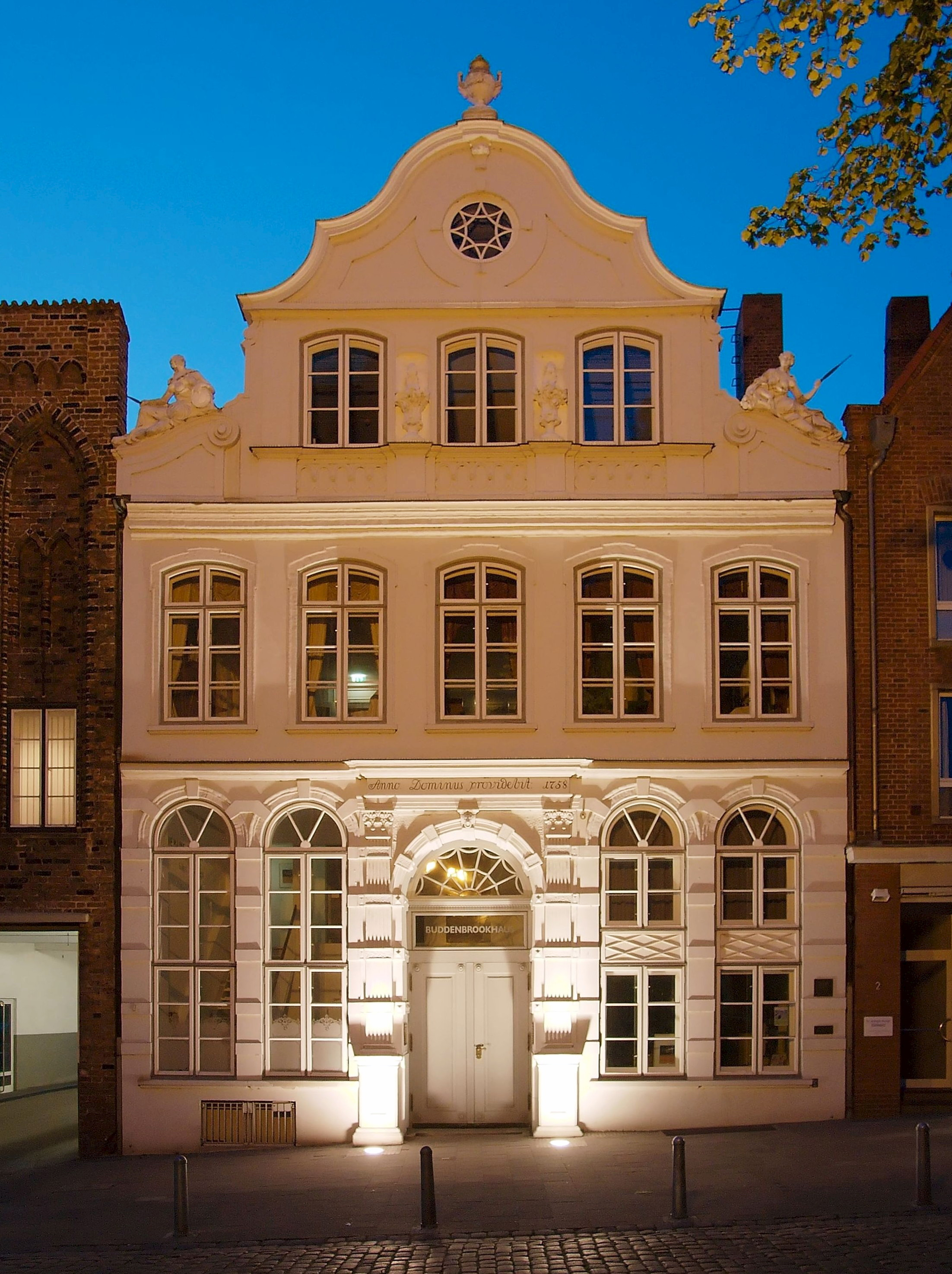 Buddenbrookhaus, Luebeck Germany